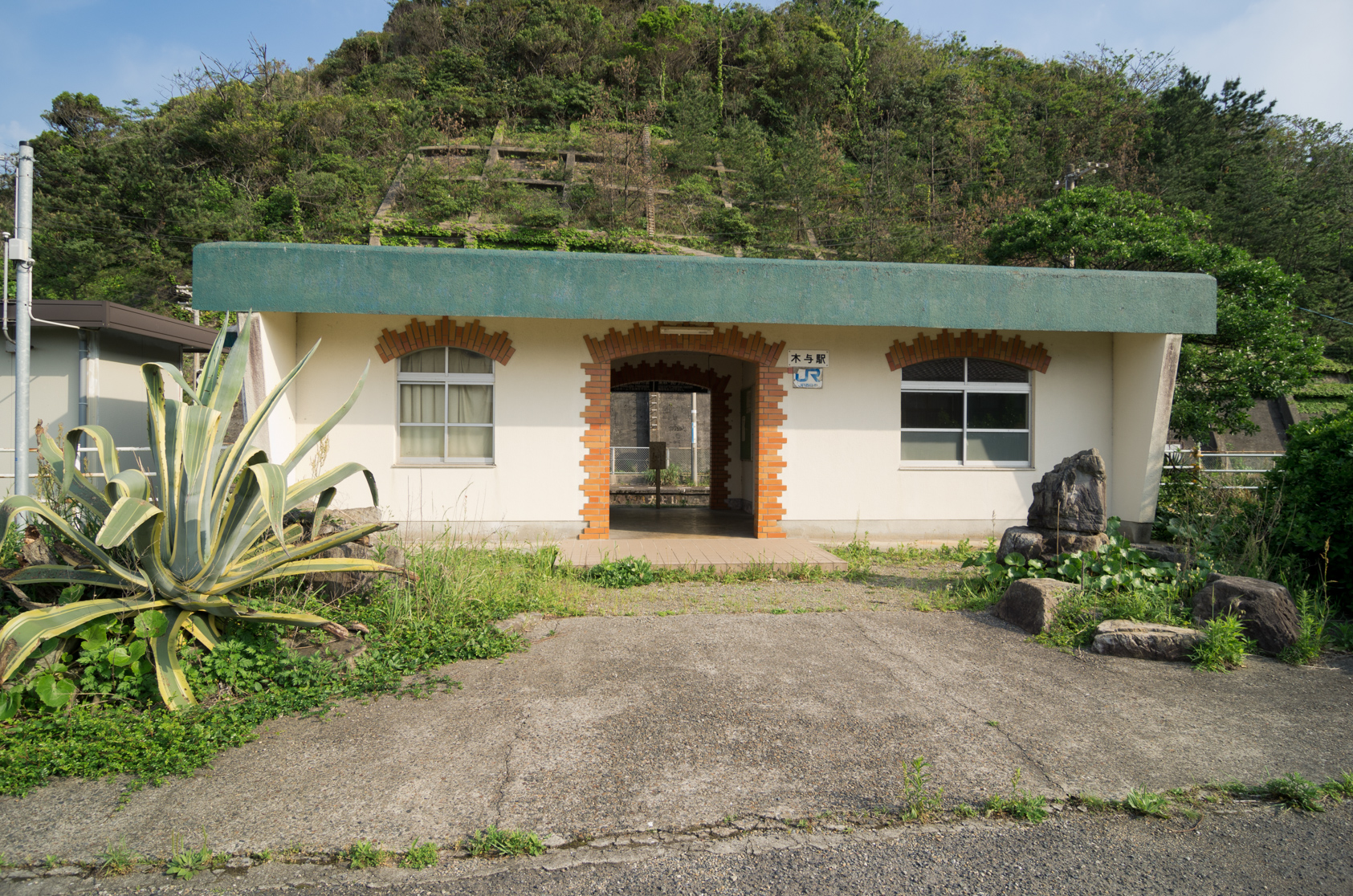 西日本旅客鉄道株式会社山陰本線木与駅